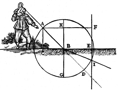 Illustration tirée du livre de Descartes, les dioptriques.